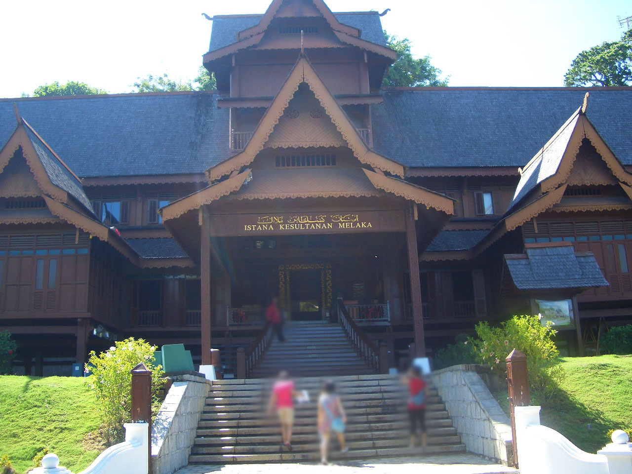 Istana Kesultanan Melaka